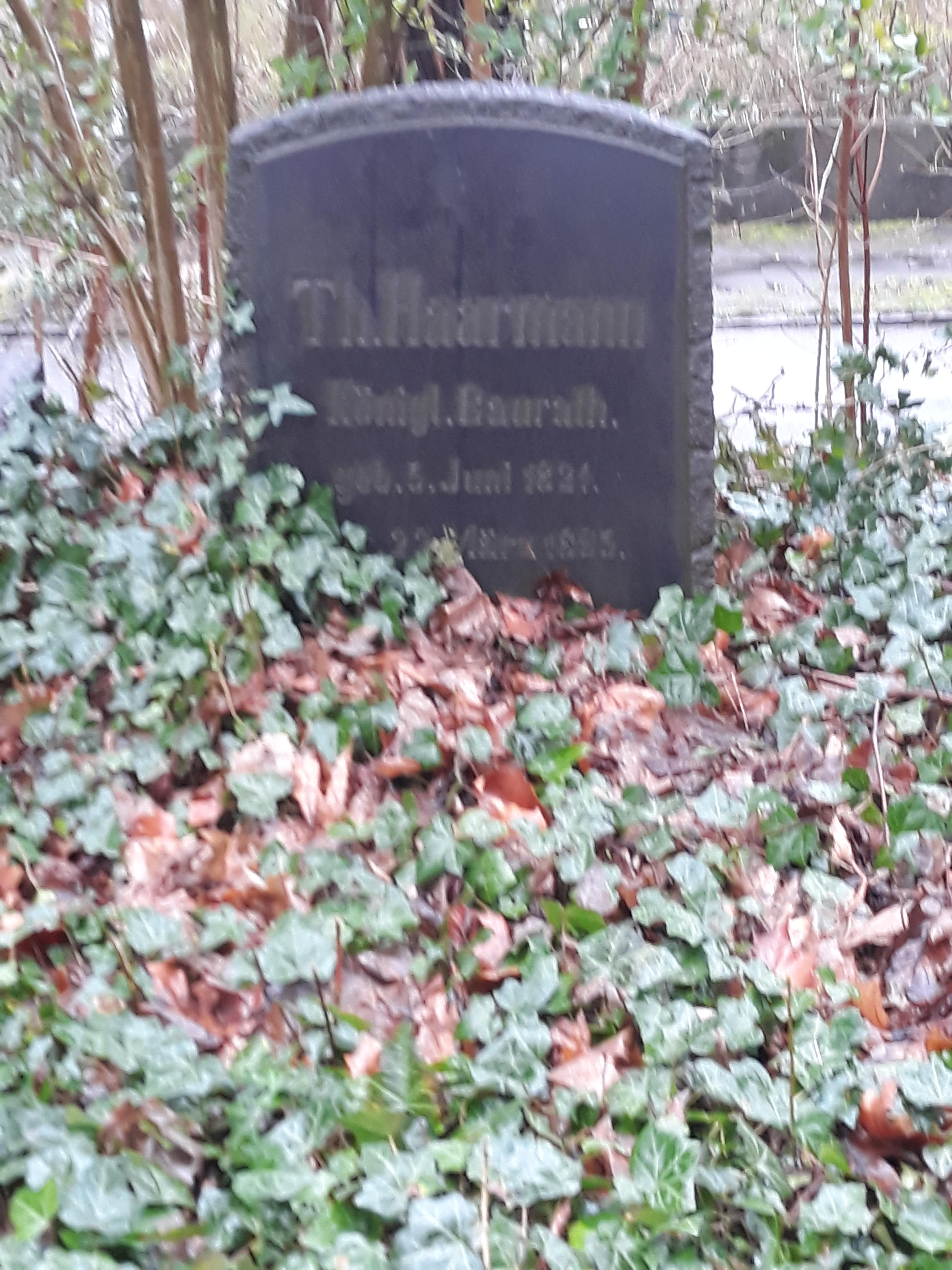 Das Grab des deutschen Architekten Theodor Haarmann auf dem Friedhof Blumenstraße in Bochum.